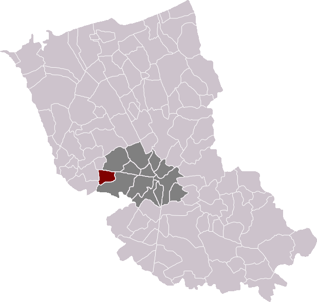 Locatie gemeente Buisscheure in arrondissement Duinkerke. Zelfgemaakt. Location of Buysscheure municipality in the arrondissement of Dunkirk. Self made. Localisation de la commune de Buysscheure dans l'arrondissement de Dunkerque. Fait moi-même.